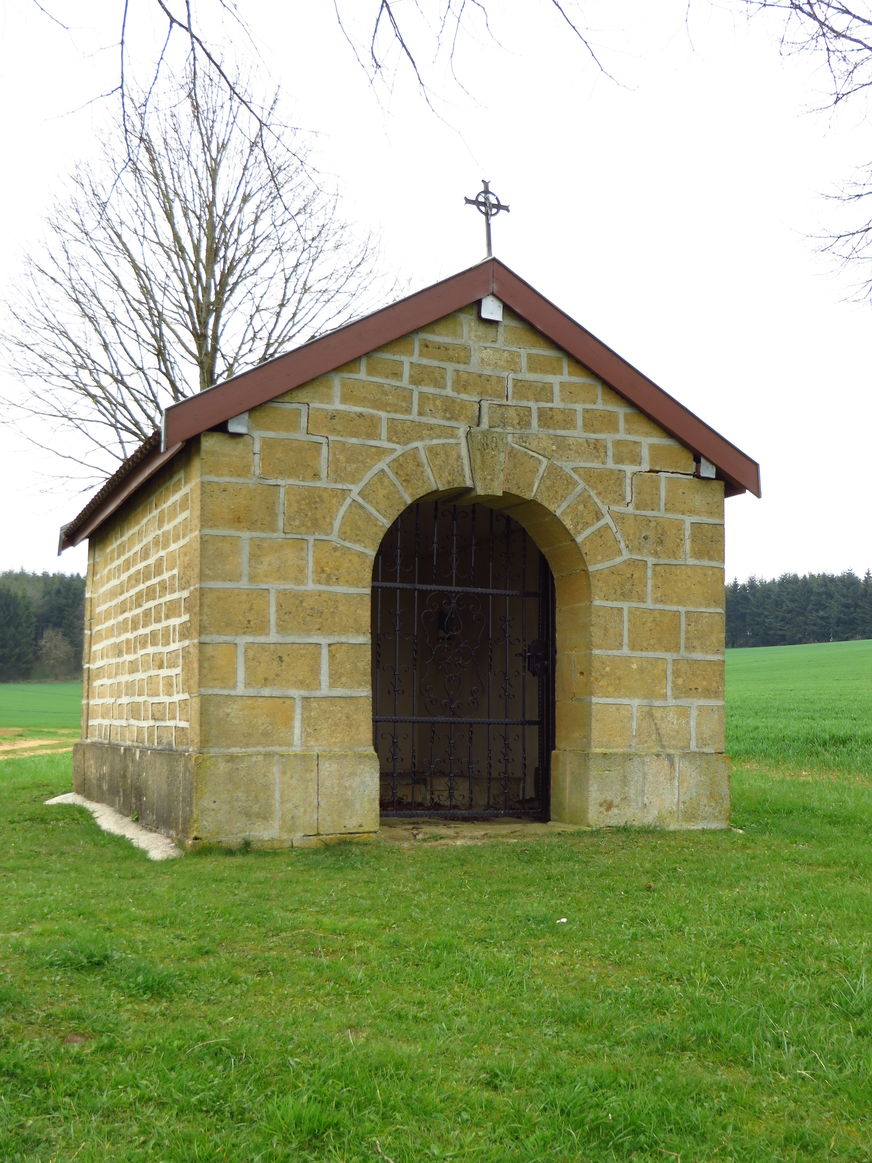 Thonne-le-Thil La chapelle Saint-Donat